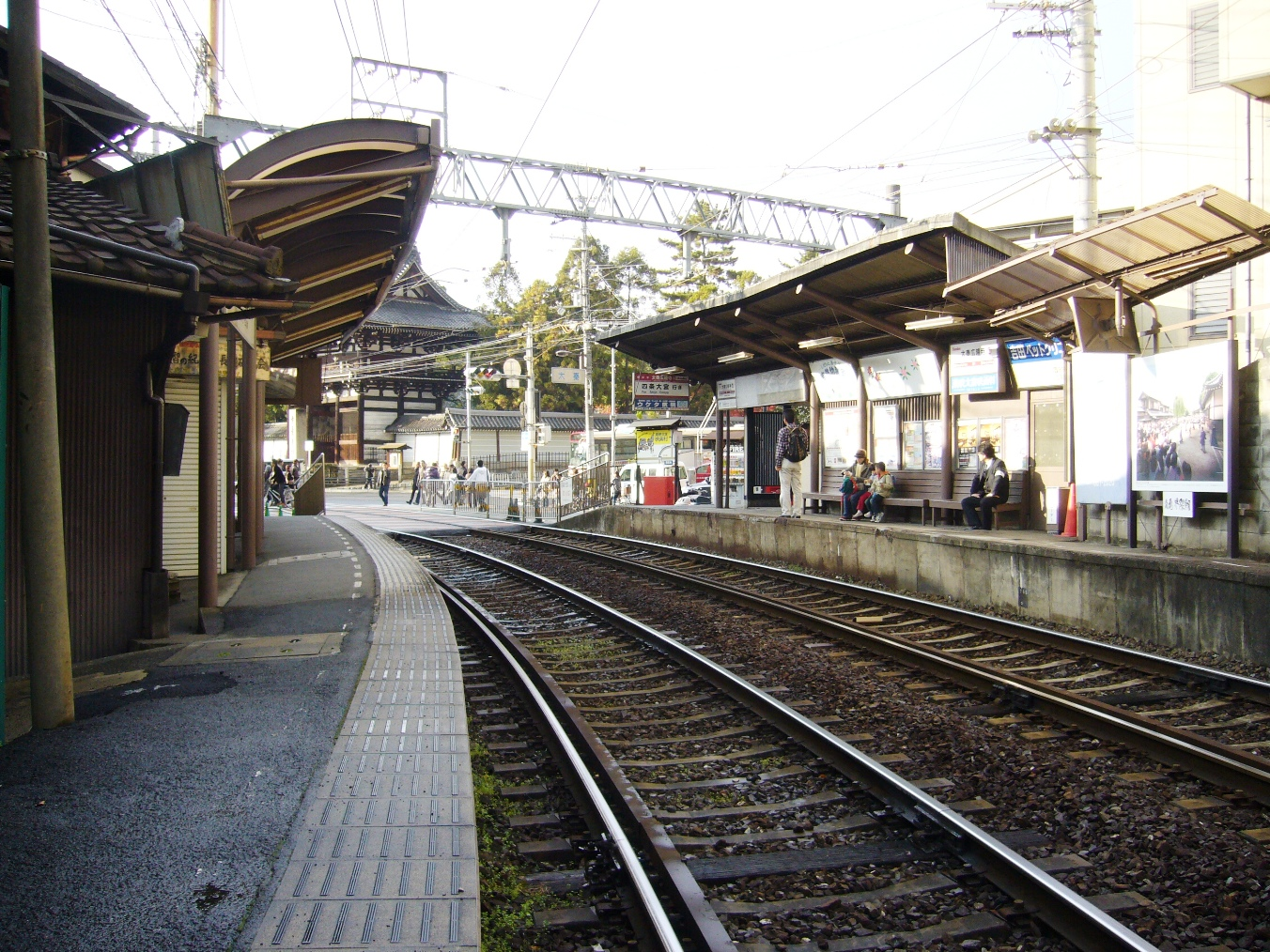 京都市右京区にある京福電気鉄道嵐山本線太秦広隆寺駅の嵐山駅方面行きホームの様子。ホームに面して商店や民家の玄関があり、反対側ホームと異なりベンチの類は設置されていない。後方には広隆寺が見える。2008年11月29日に投稿者が撮影。